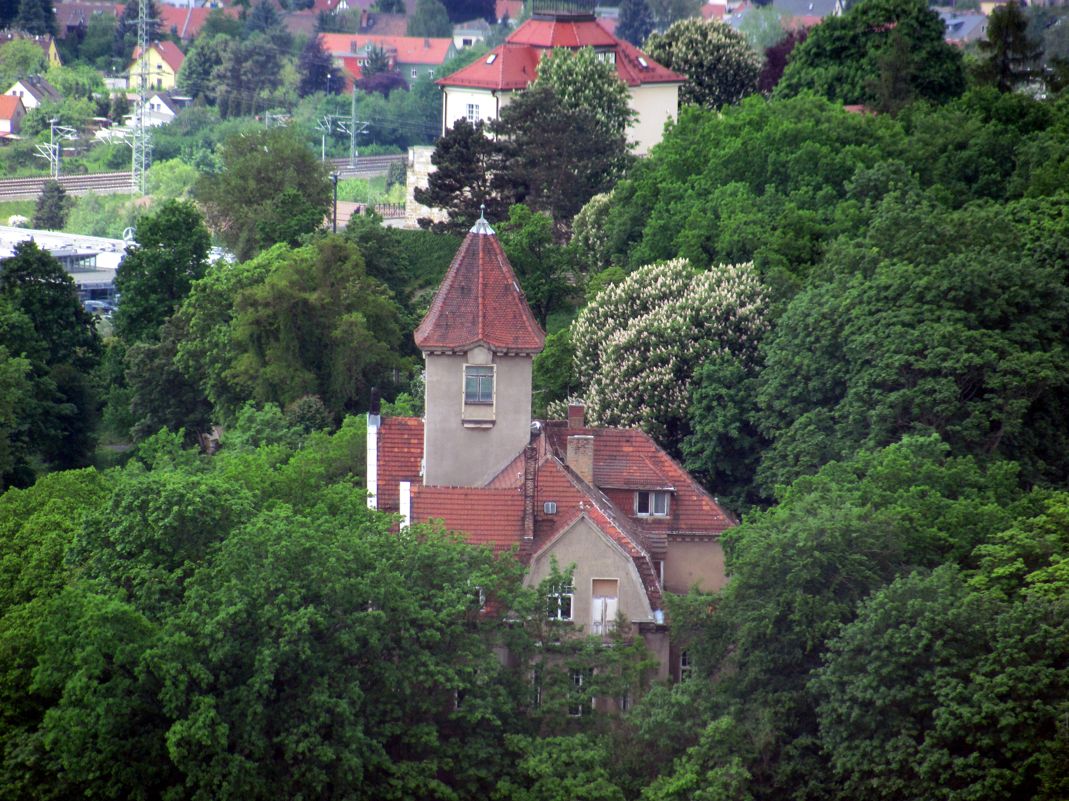 Radebeul, Meyerburg, dahinter Mätressenschlösschen, vom Wasserturm Dachfenster aus